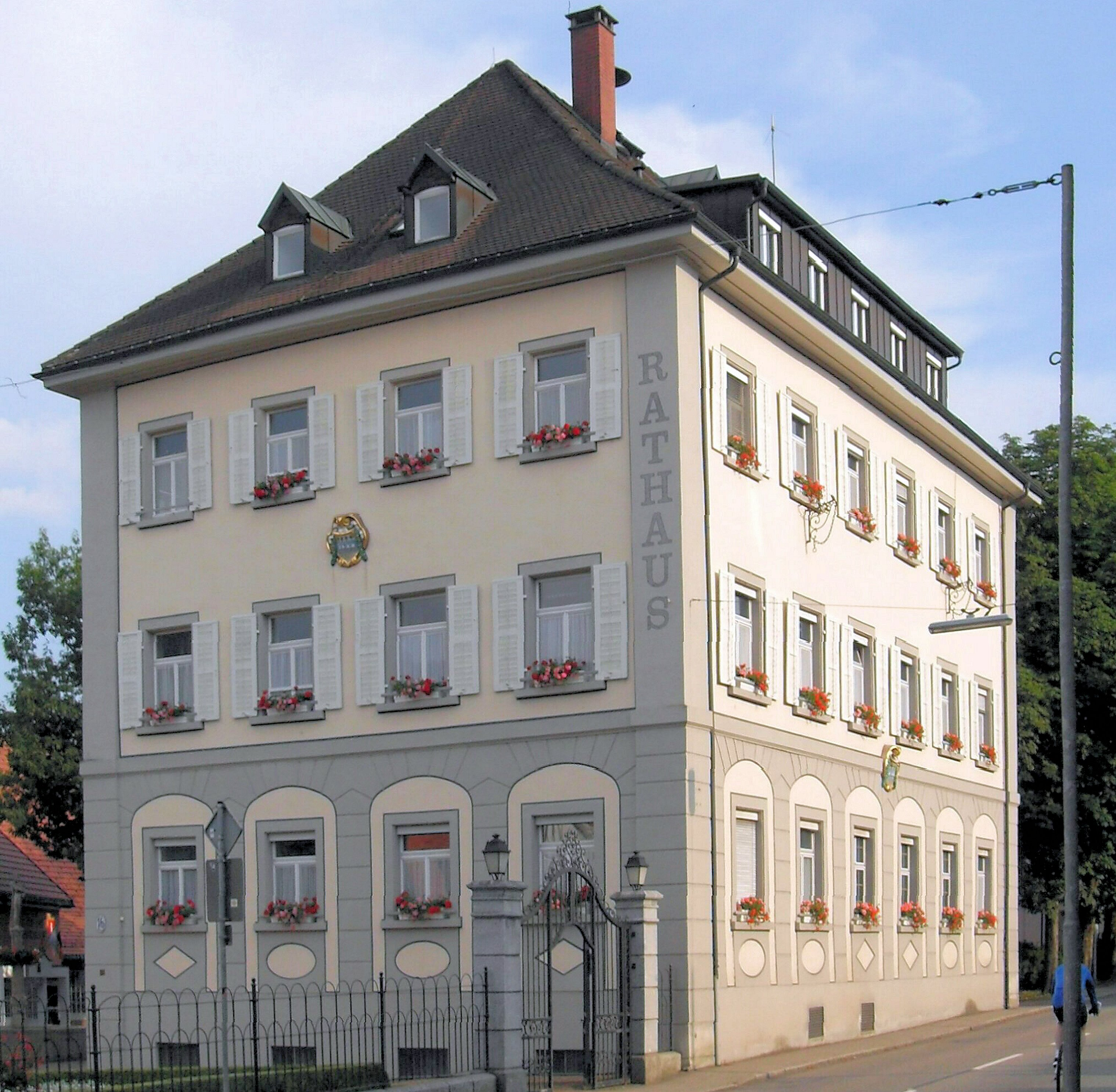 Rathaus in Wehr im Neuen Schloss